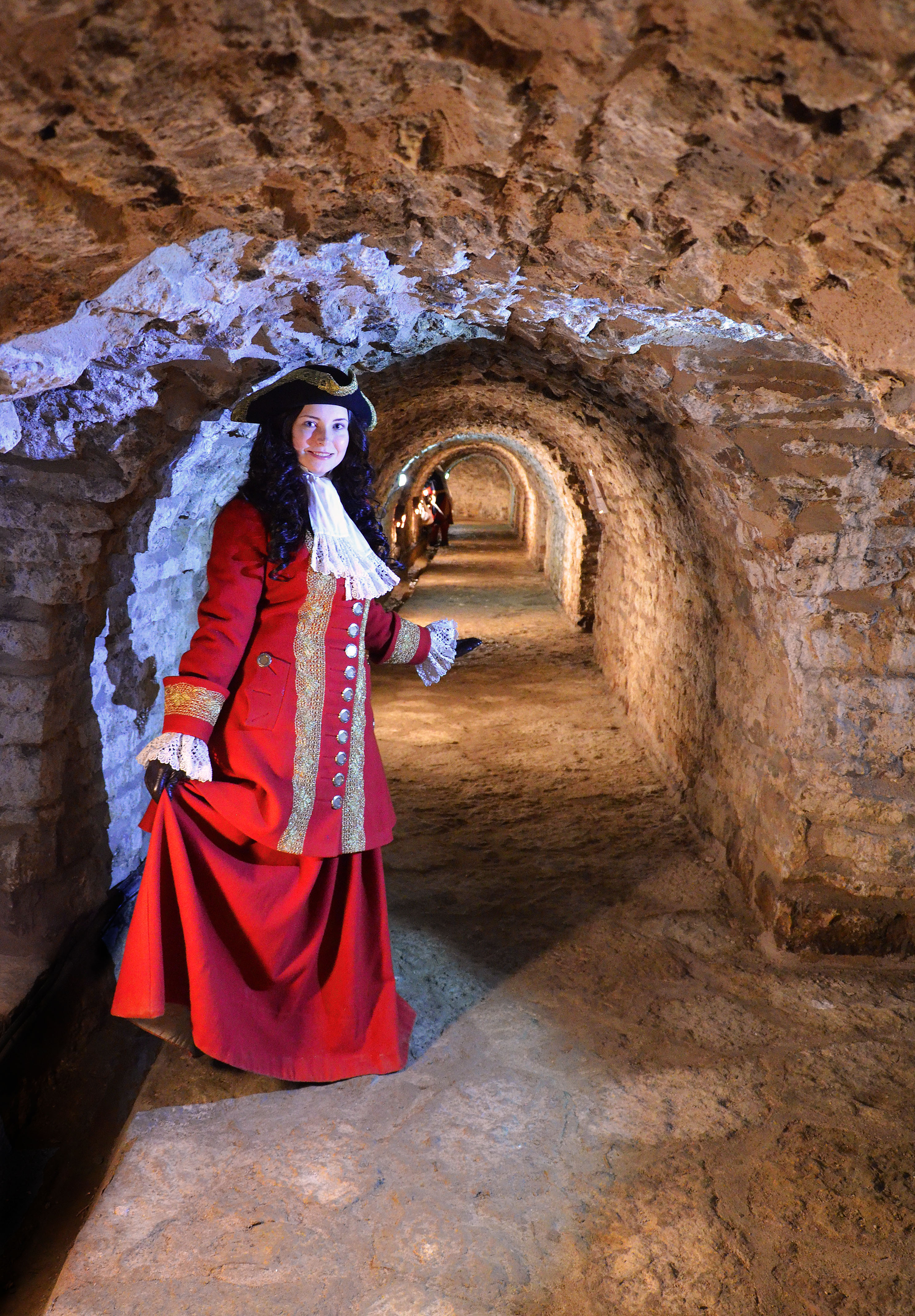 Narva Victoria bastioni kasematid